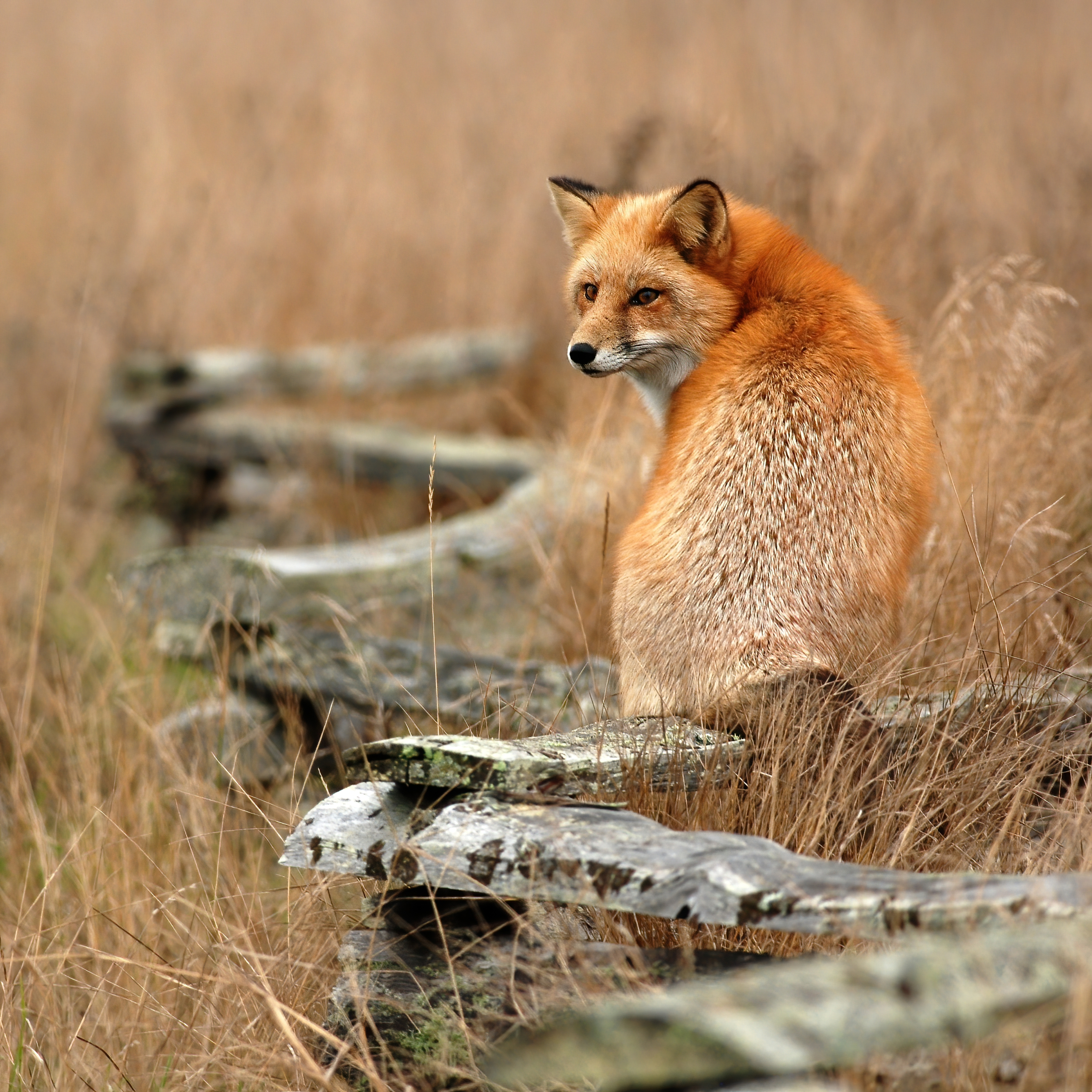 Renard roux (Vulpes vulpex) vu de dos.